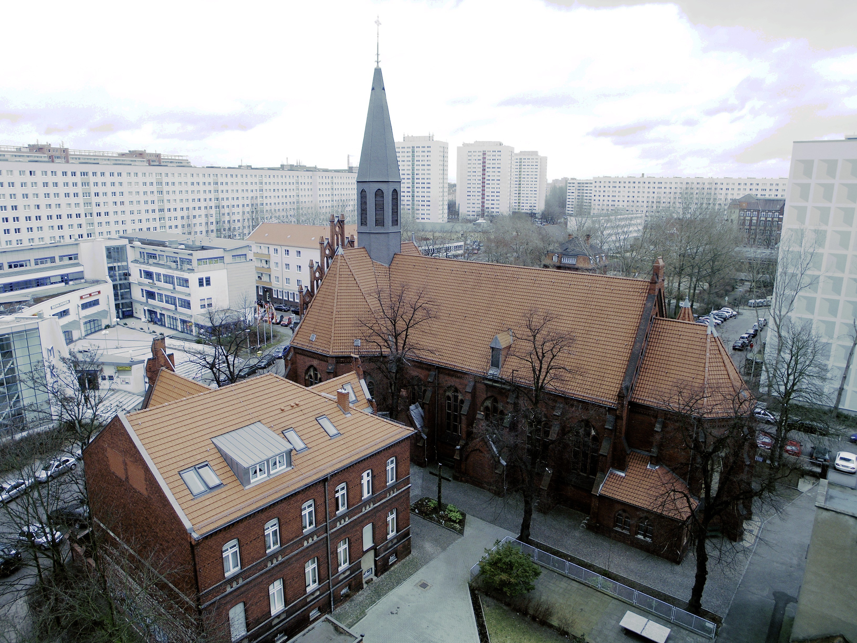 Gesamtansicht der Mauritiuskirche und des Pfarrhauses